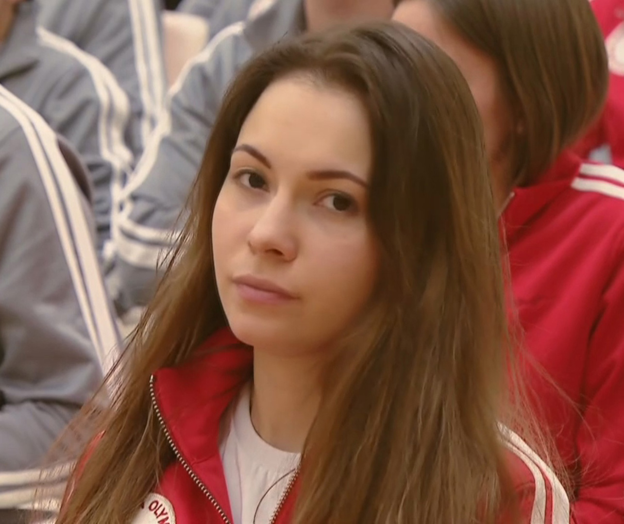 Российская шорт-трекистка Эмина Малагич.